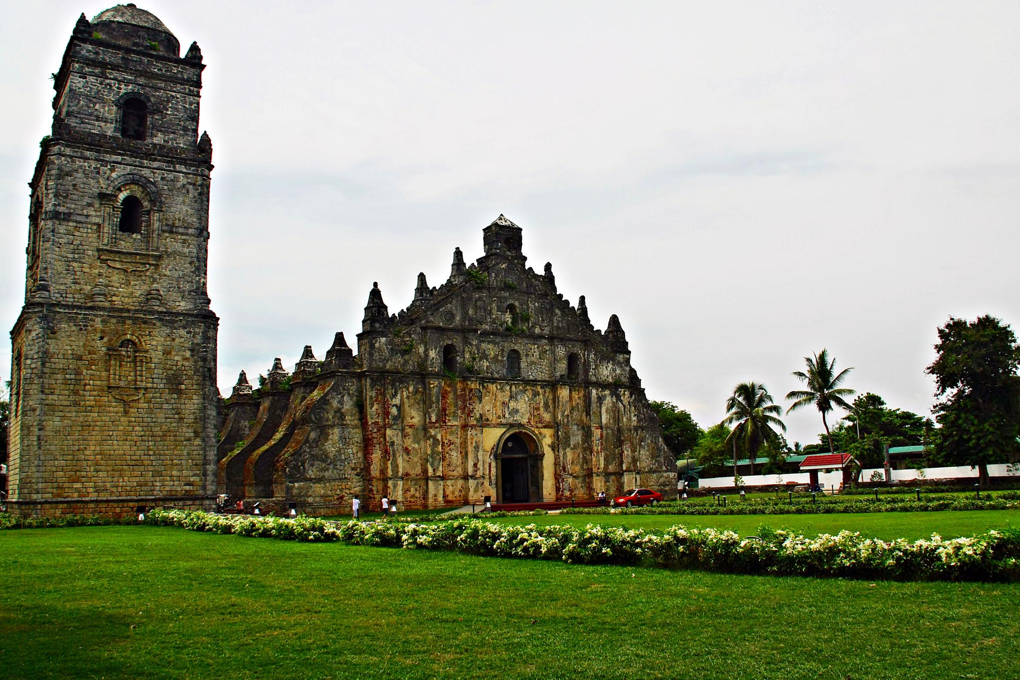 Paoay, Ilocos Norte, Philipppine